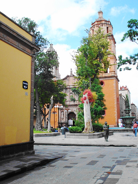 Templo de San Francisco en San Luis Potosí, México.